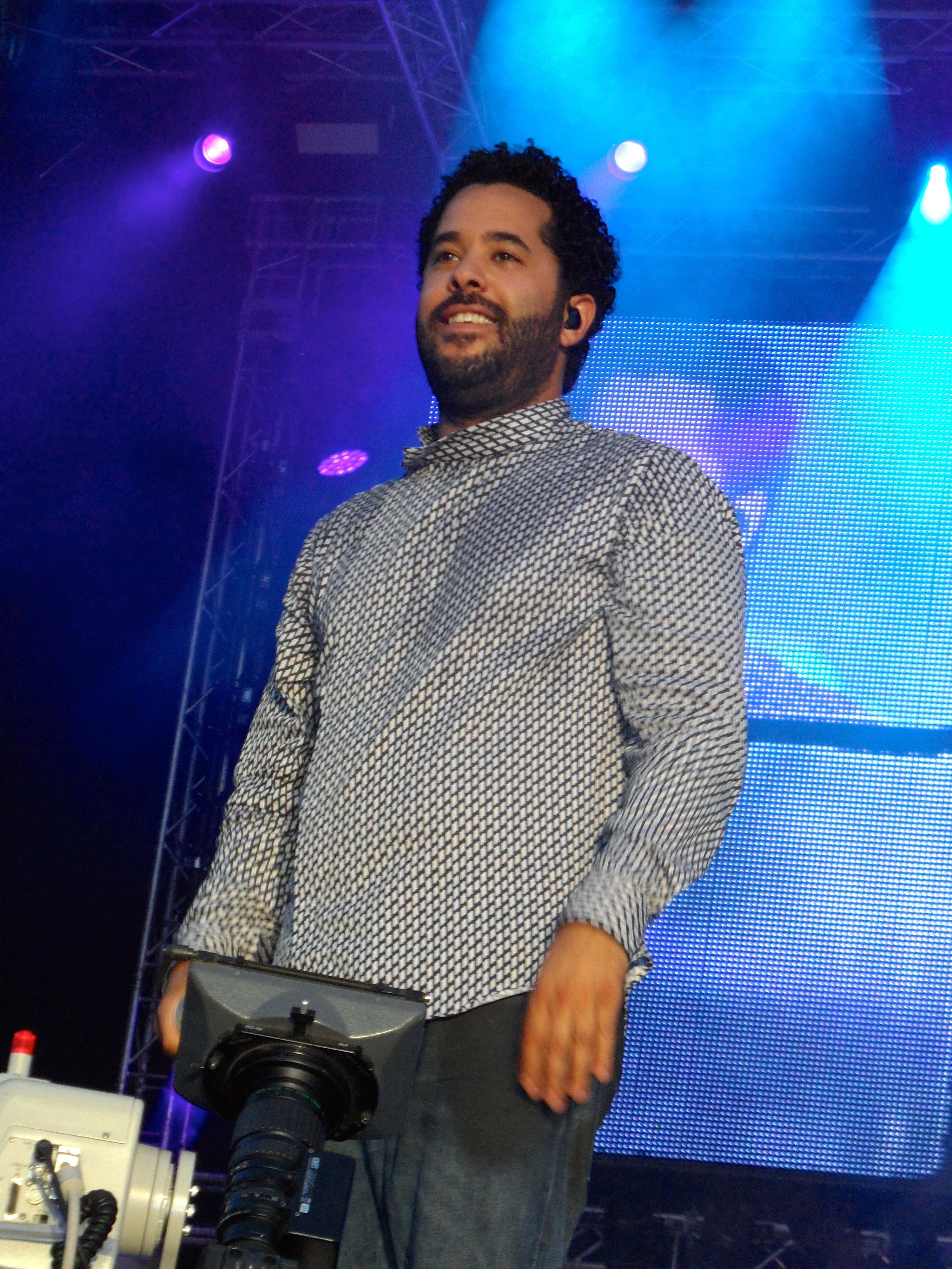 Adel Tawil bei stars@nrd2 in Vechta